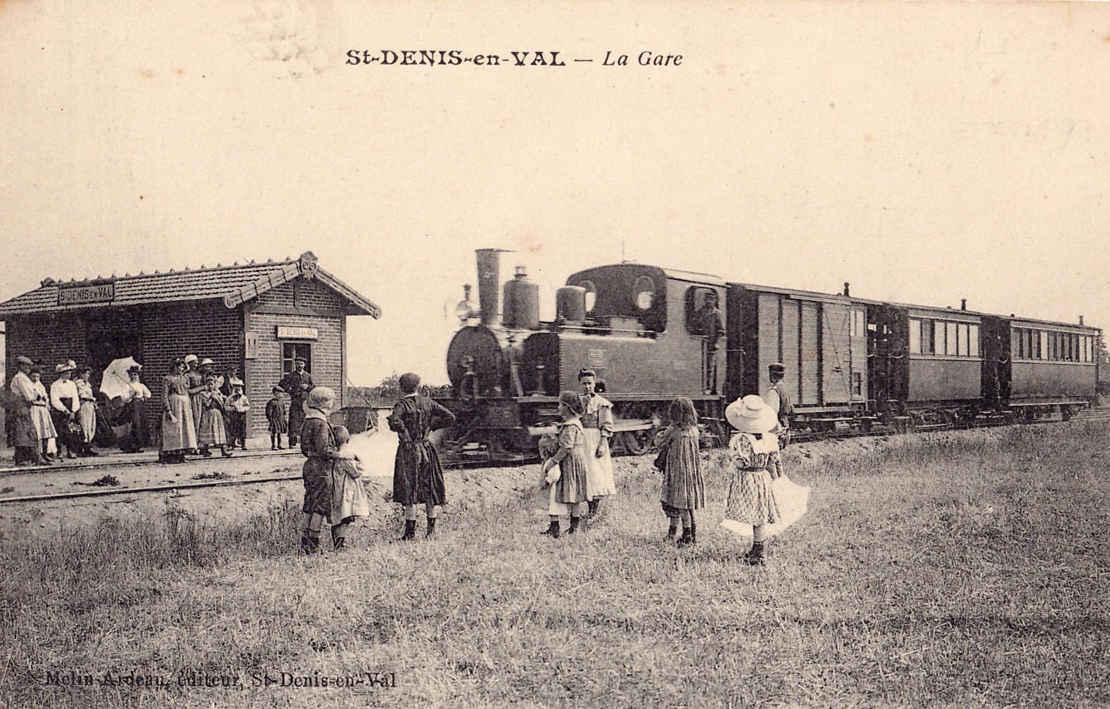 Carte postale ancienne éditée par Melin-Ardeau à Saint-Denis-en-Val : St-DENIS-en-VAL - La Gare